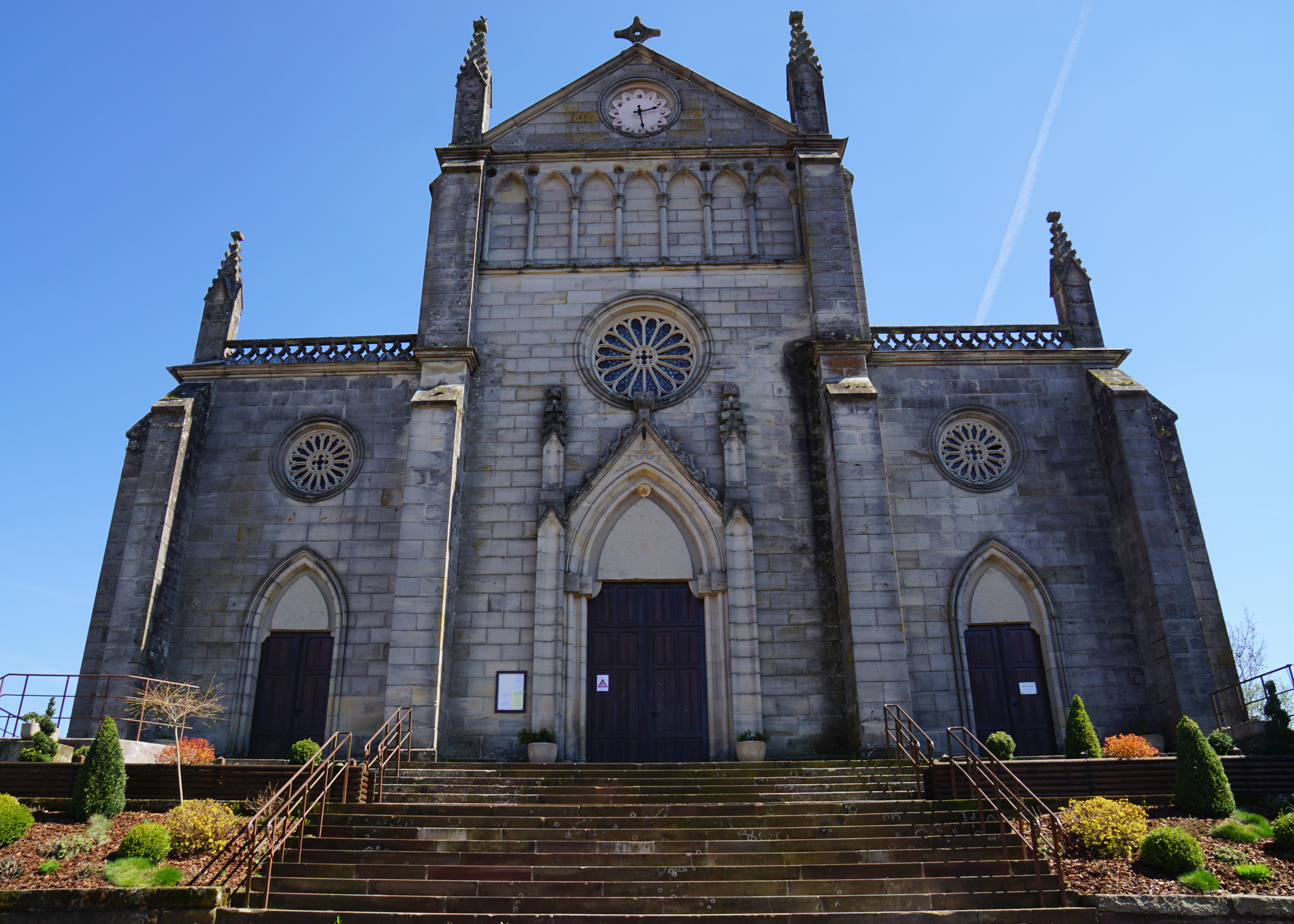 Église Saint-Pierre-et-Saint-Paul de Mélisey.